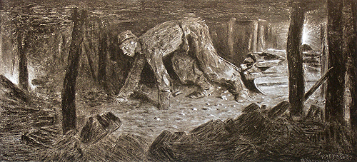 Шахтер-тягольщик